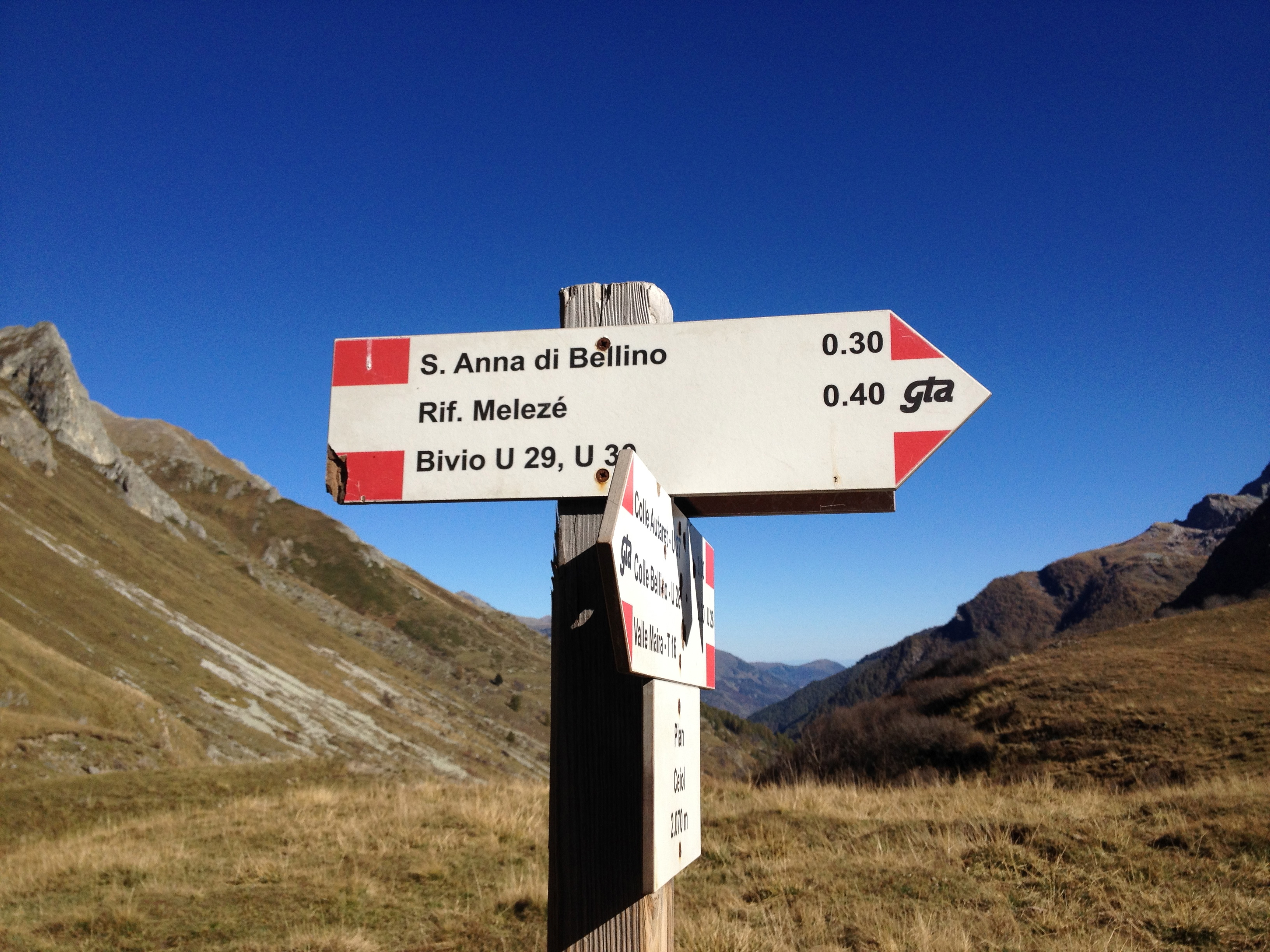 pian ceiol